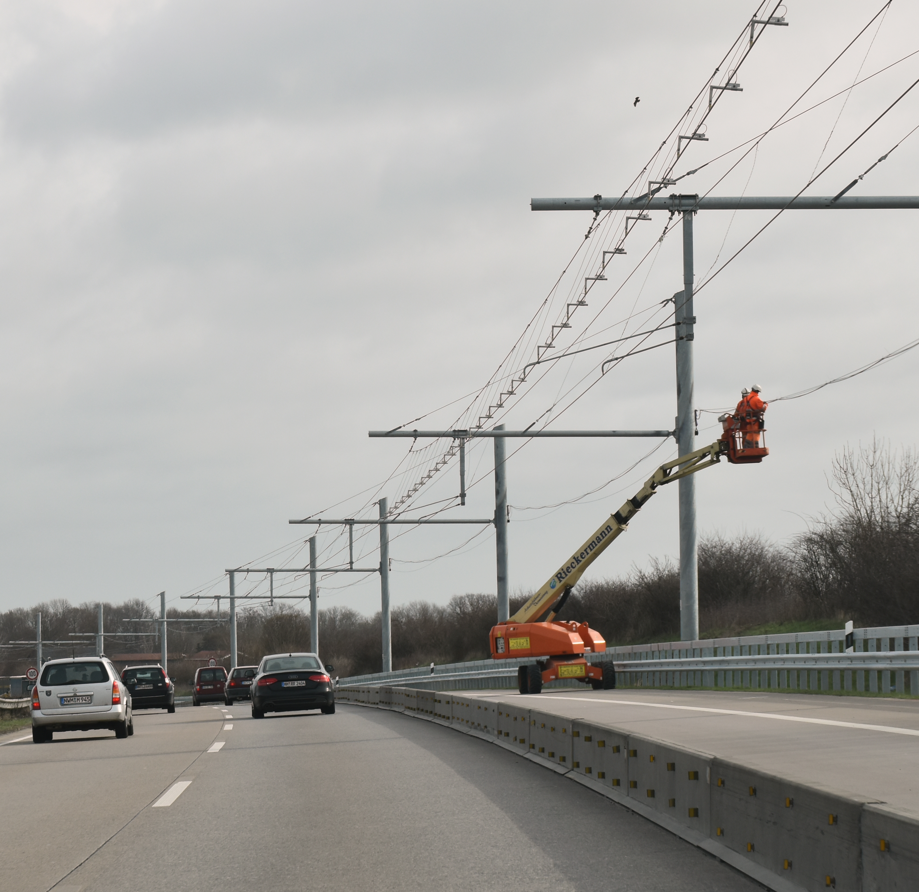 Bau des eHighway auf der A1 zwischen der Anschlussstelle Reinfeld und dem Autobahnkreuz Lübeck im März 2019